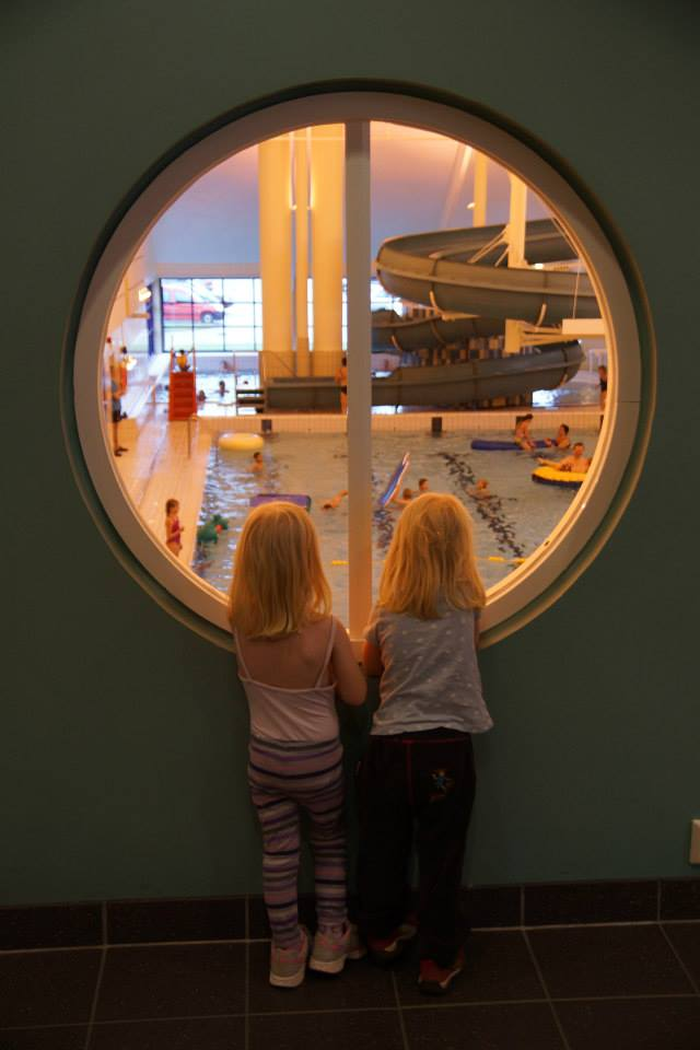 Tysværtunet badeanlegg sett fra vindu i vestibyle